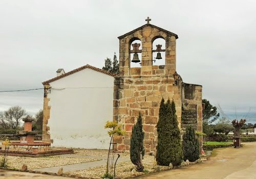 Iglesia de Abadía-Cáceres